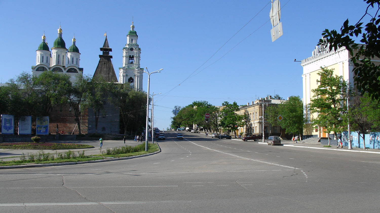 Astrakhan Kremlin (left)